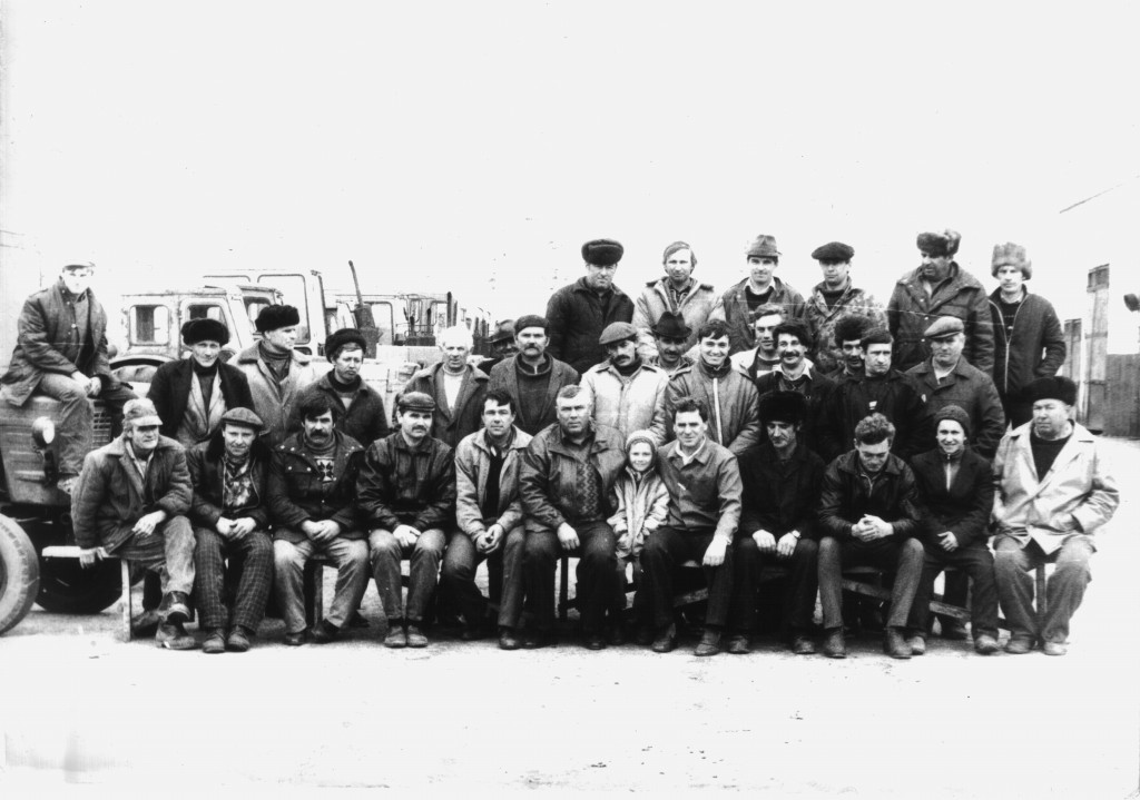 Працівники тракторної бригади